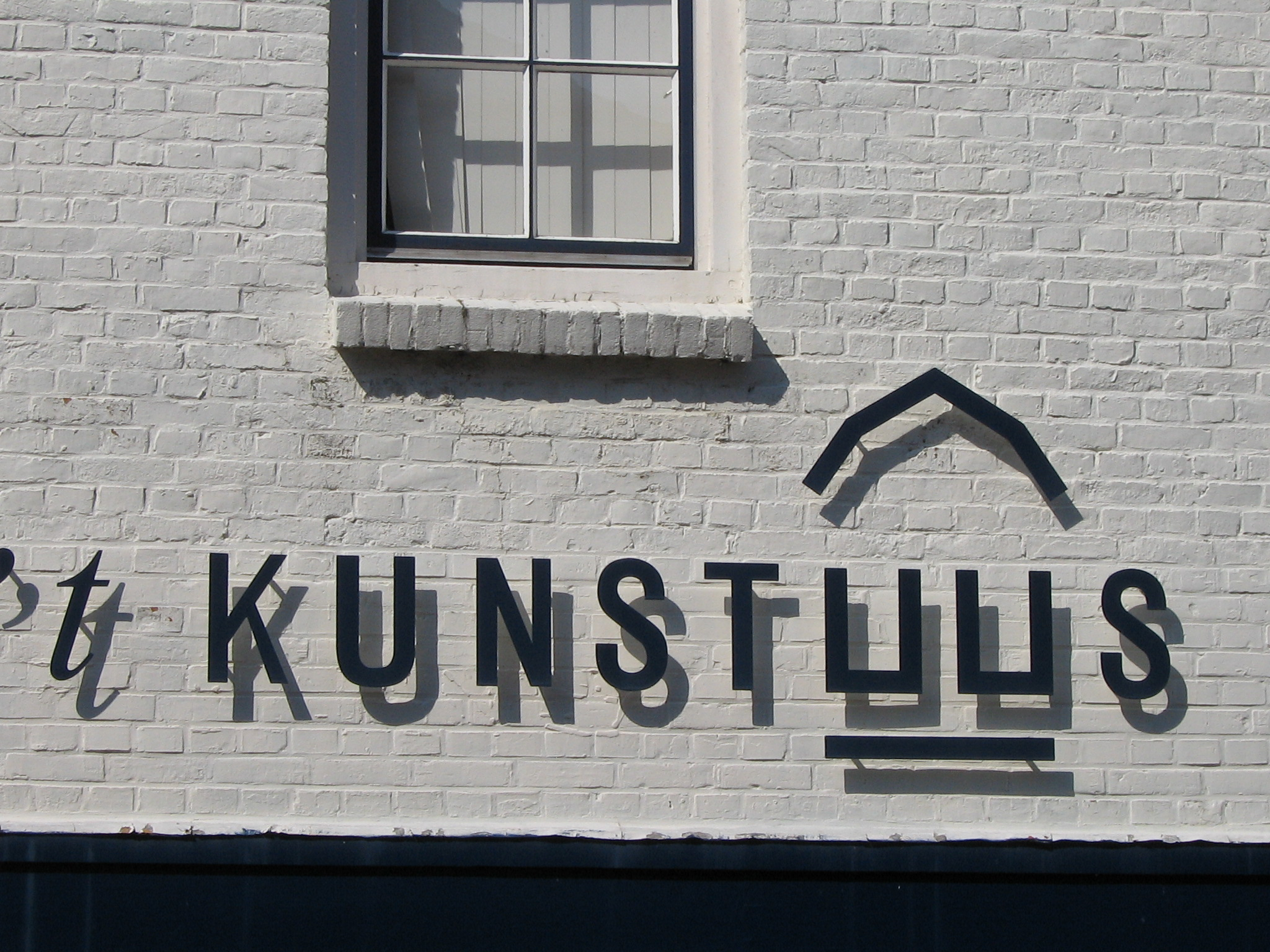 Kunstuus: Zeêuws opschrift in Eintjessand.Kunstuitleen in Heinkeszand, gemeente Borsele, met een Zeeuwse naam.